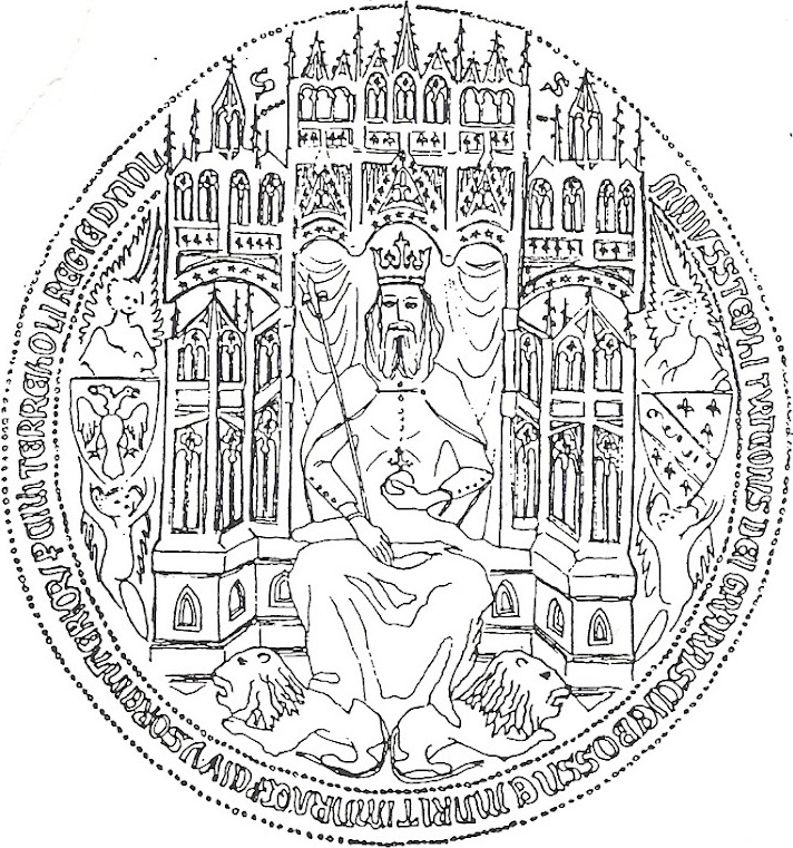 Печат краља Твртка I Котроманића